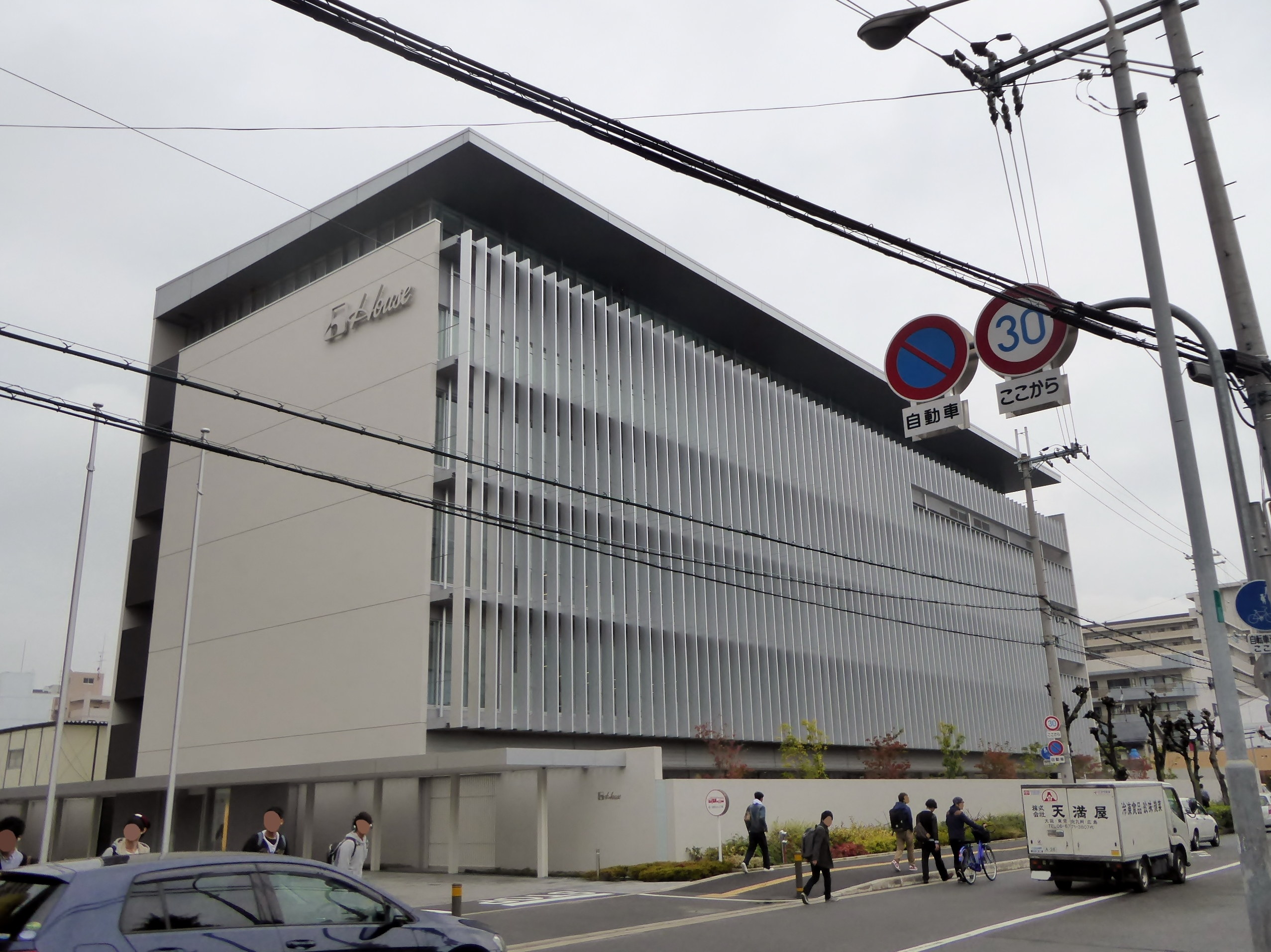 ハウス食品グループ本社株式会社本社を撮影。